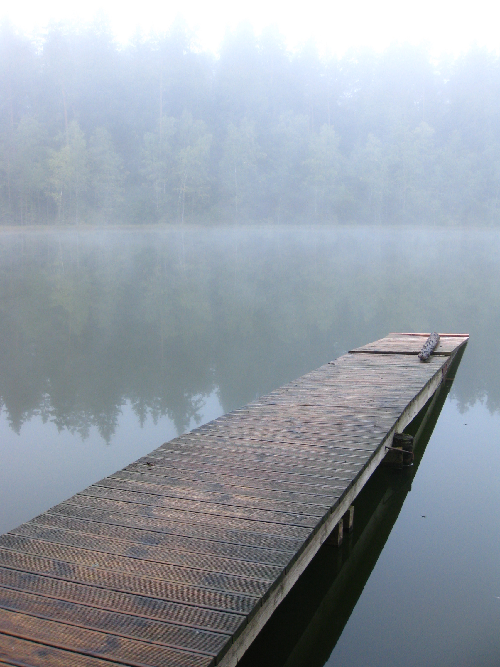 Vaikne järv udus Elva-Vitipalu maastikukaitsealal